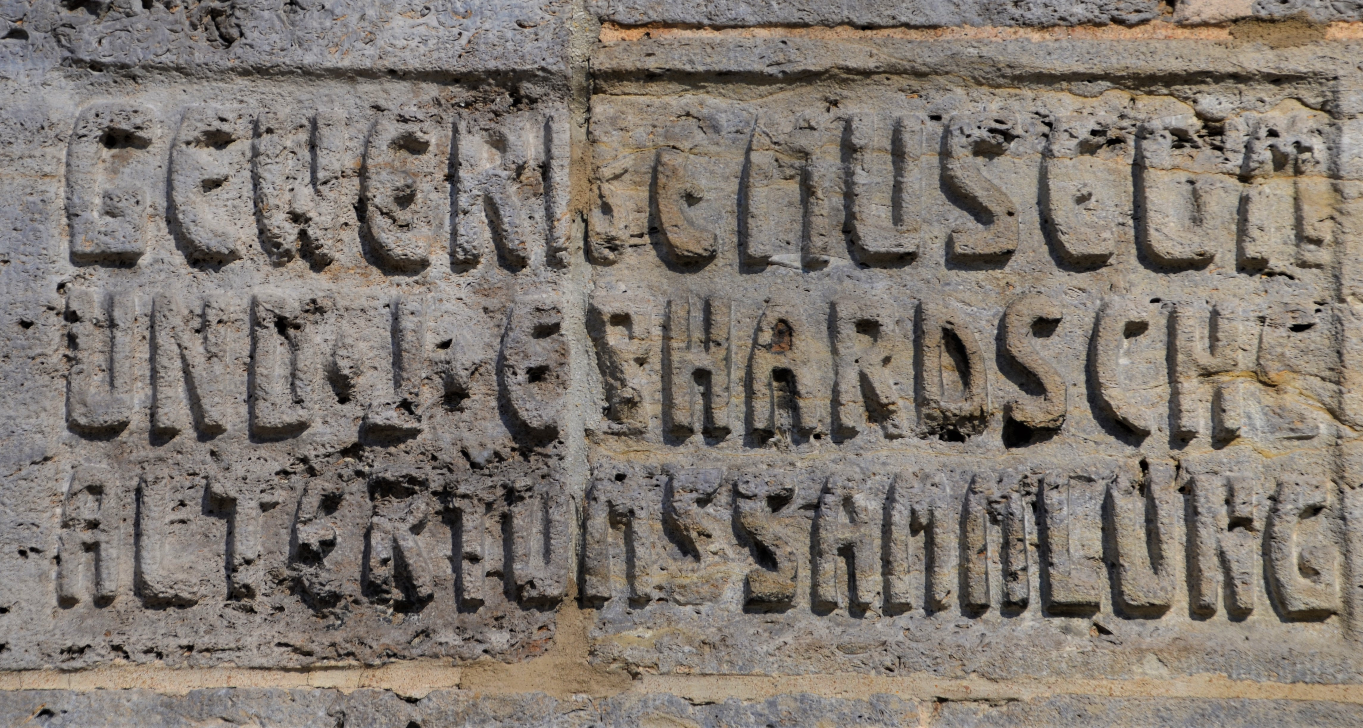 Tafel "Gewerbemuseum und Erhardtsche Altherthumssammlung" am Eingang an der Südfassade zur HfG Gmünd